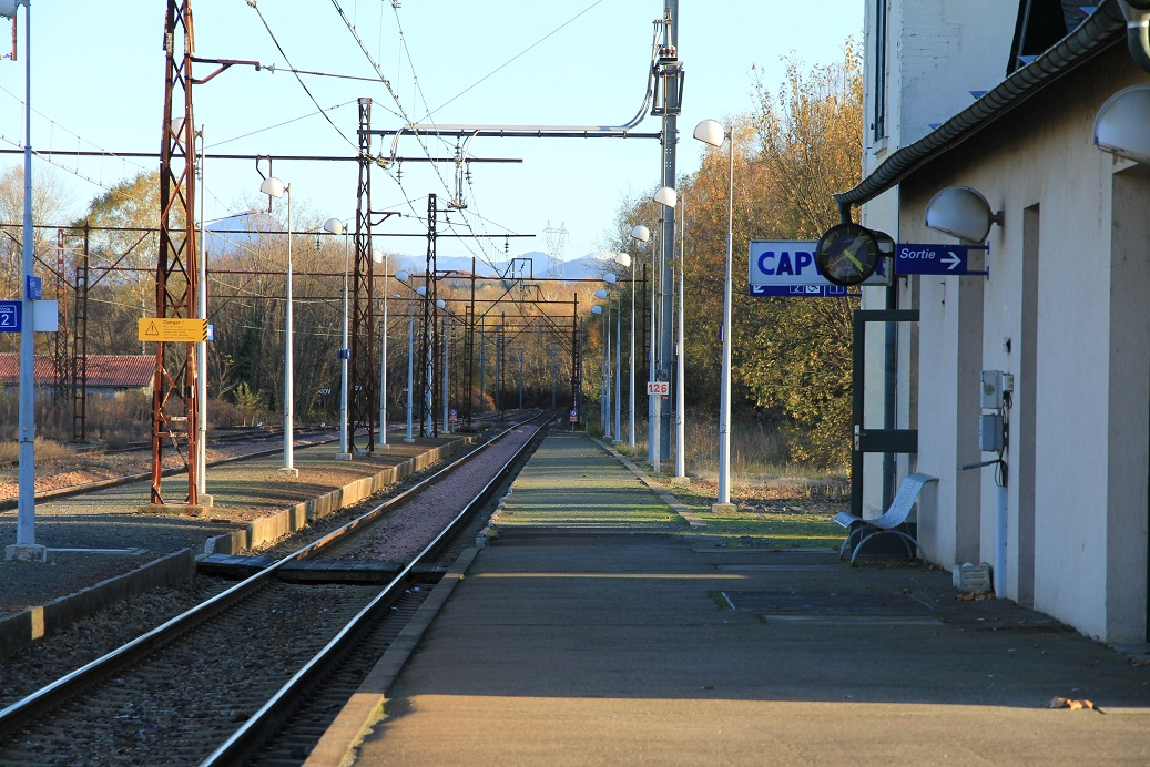 Vue des voies en direction de Lannemezan en gare de Capvern en novembre 2010, Hautes-Pyrénées, France.